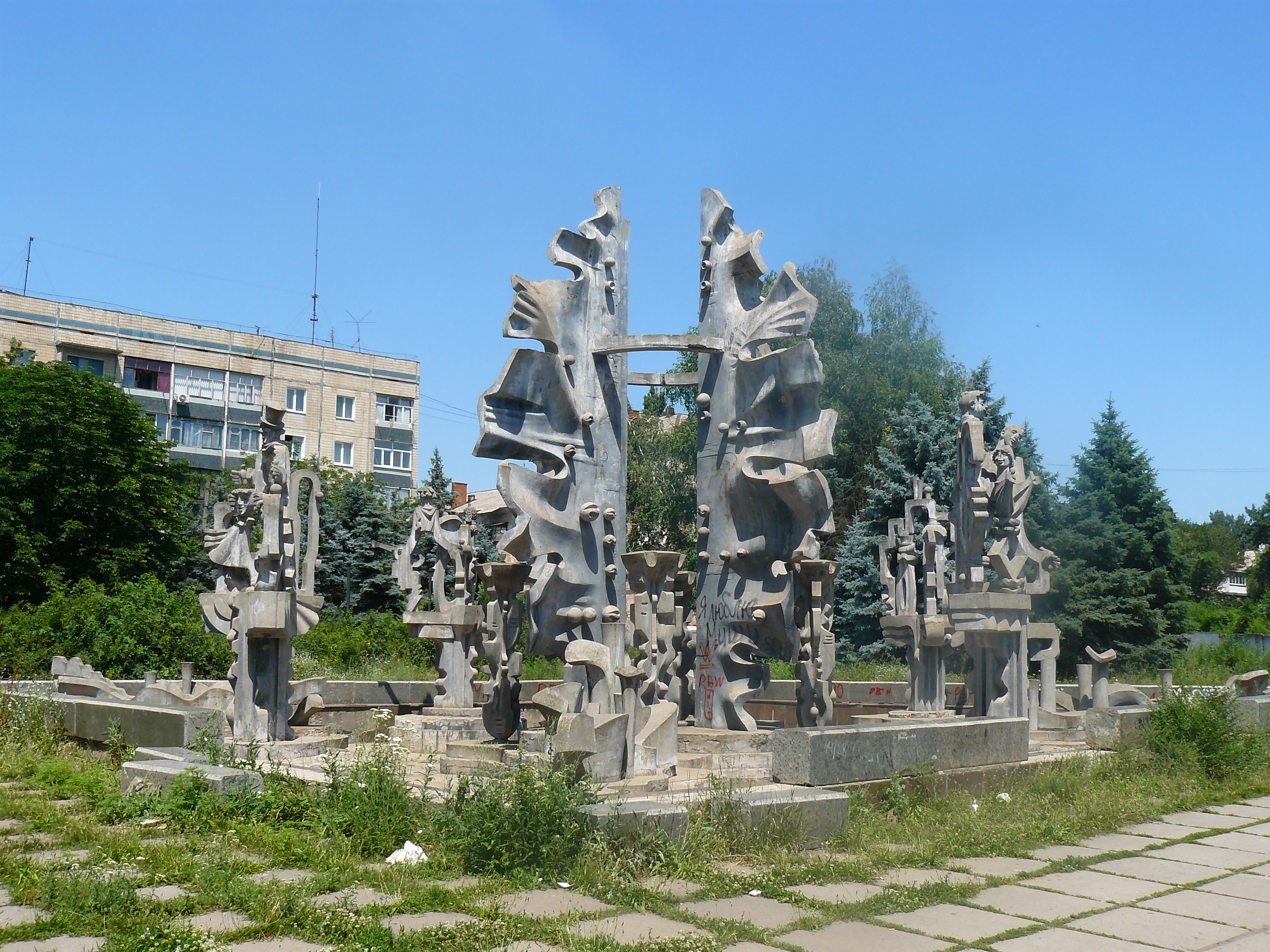 Фонтан «Сказка», г. Кривой Рог.